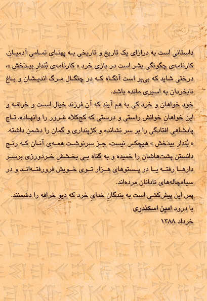 پشت نویس بوکلت نایش بندار بیدخش